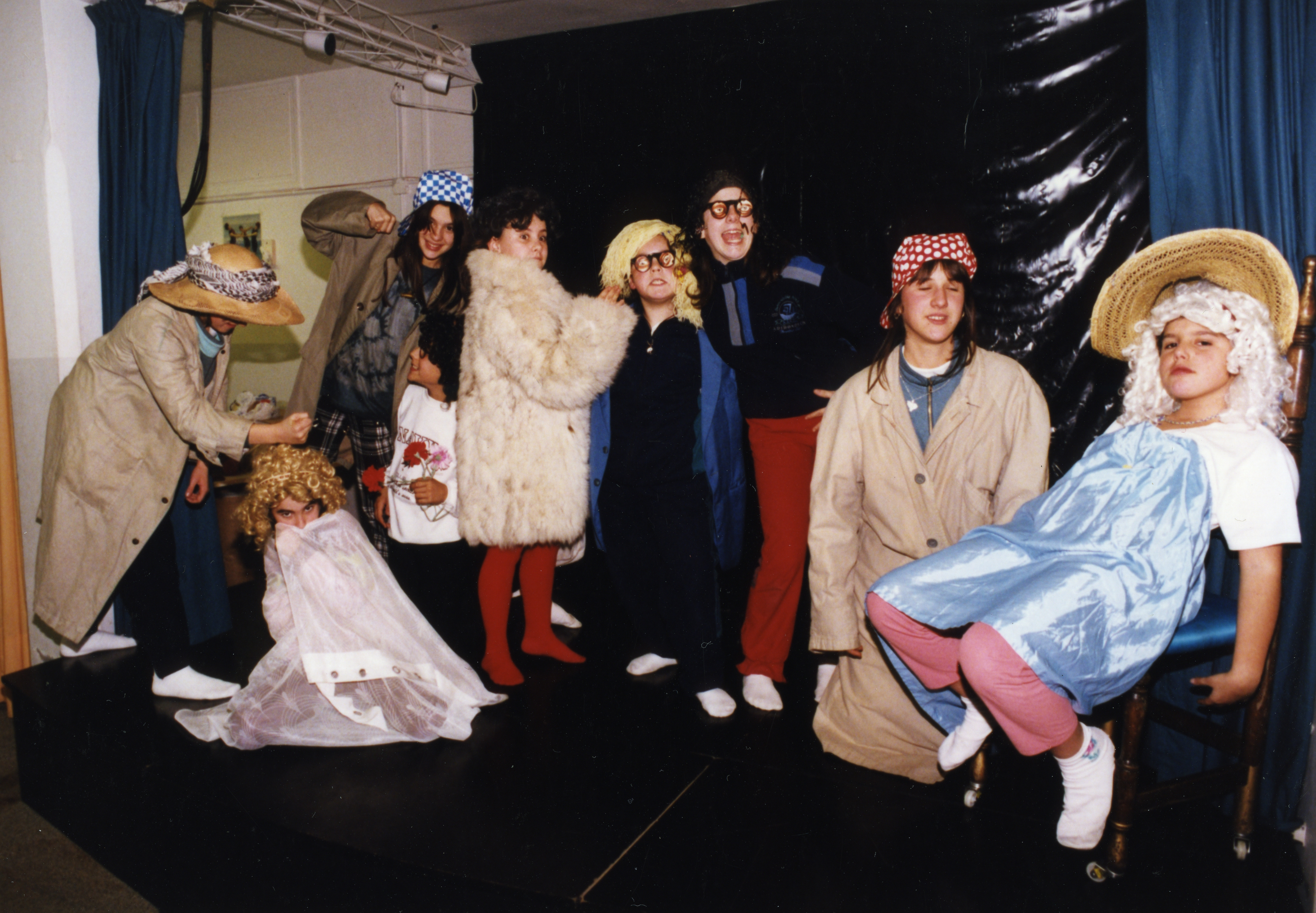 Gaztetxo taldea antzerki tailerrean. Aiurri 30 zbk. 6. orr.